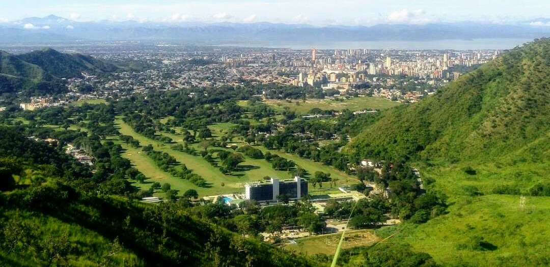 Maracay cerro hotel